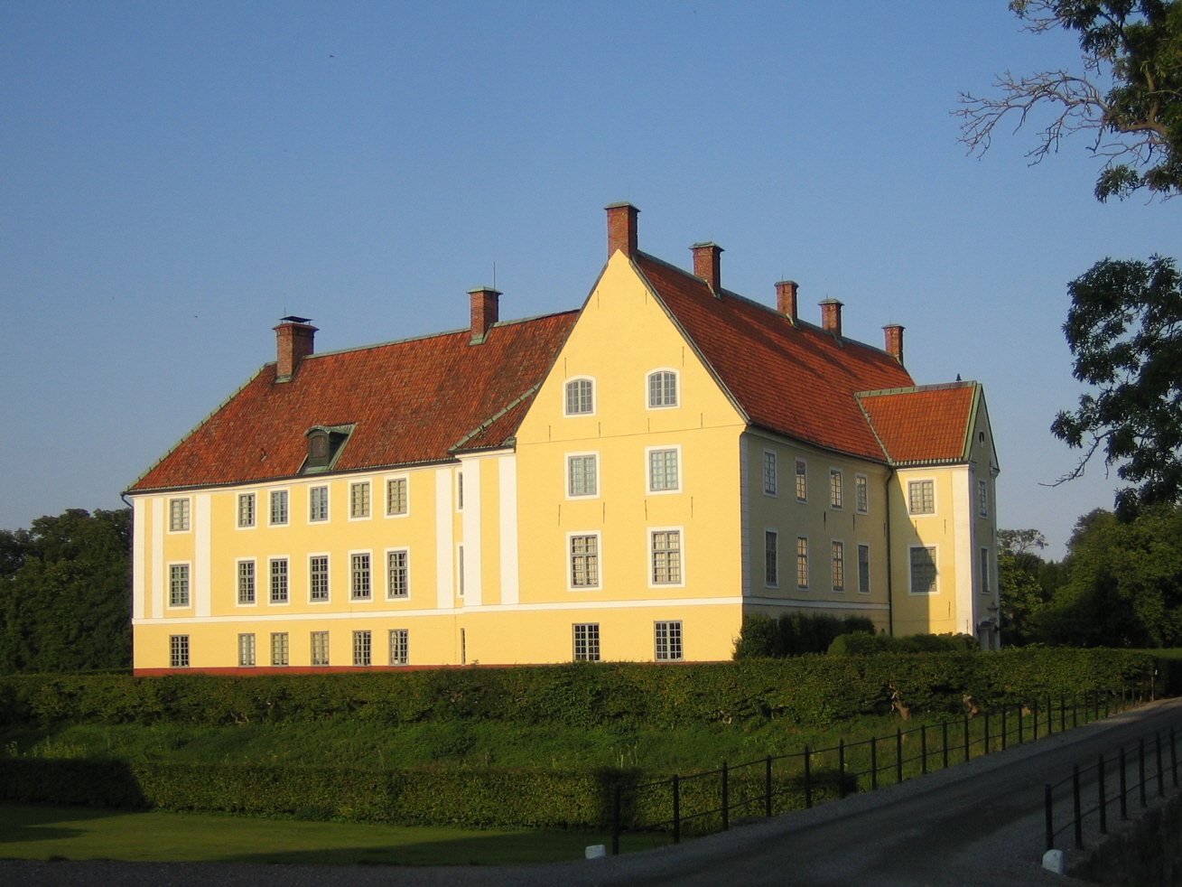 Krageholms slott. Bilden tagen av mig själv 21 augusti 2005.